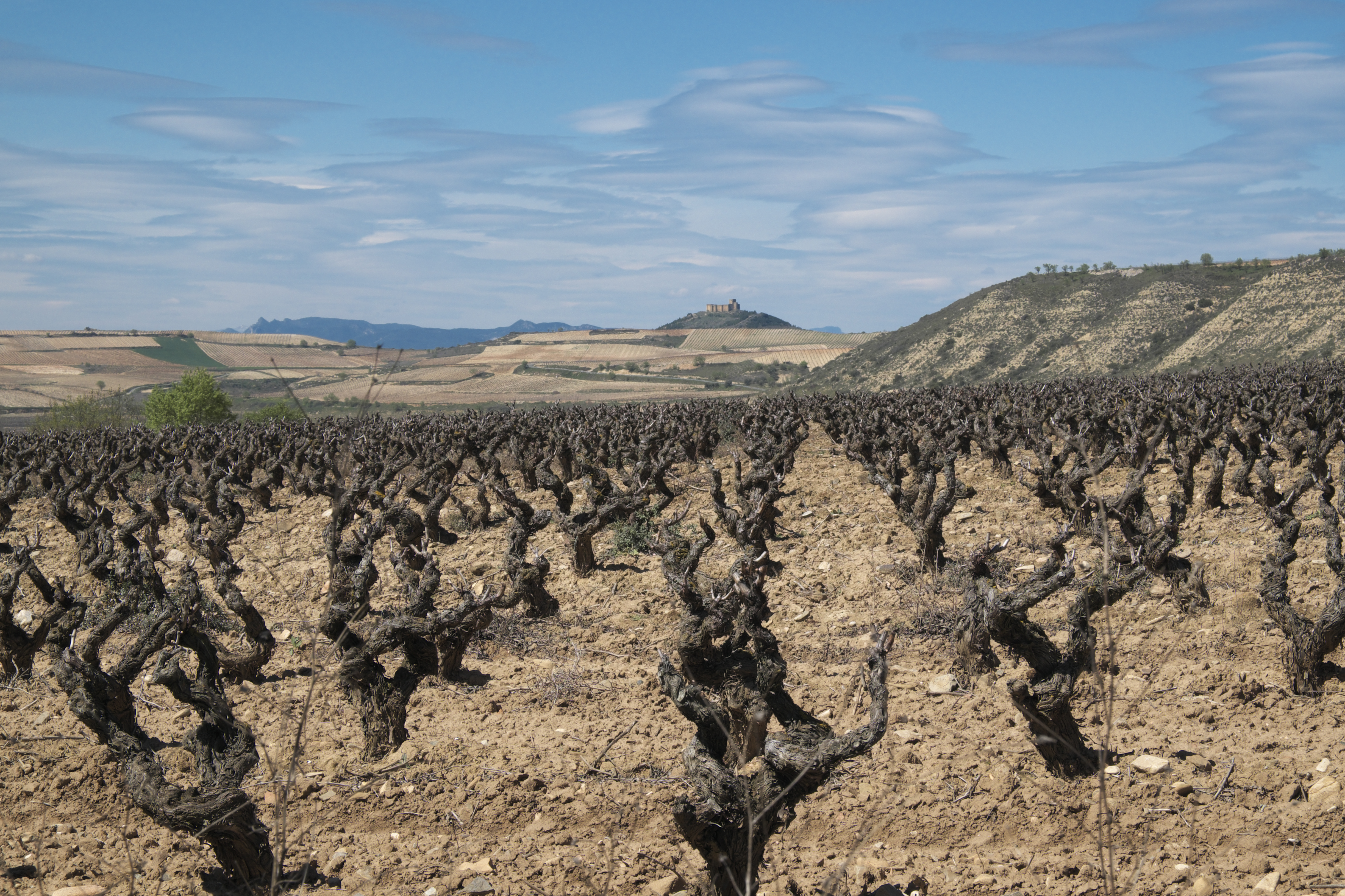 Weinberge bei San Asensio in der spanischen autonomen Gemeinschaft La Rioja, im Hintergrund die Burg Castillo de Davalillo